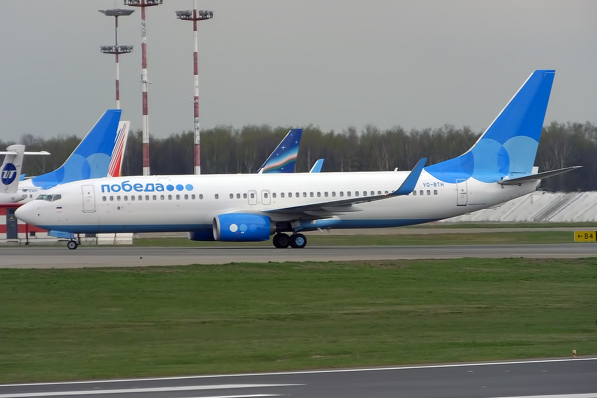 Pobeda, VQ-BTH, Boeing 737-8LJ